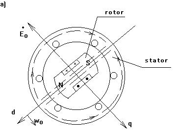 Oʻzbekcha/ўзбекча: Stator va rotor sinxron mashinaning asosiy qismlari hisoblanadi.